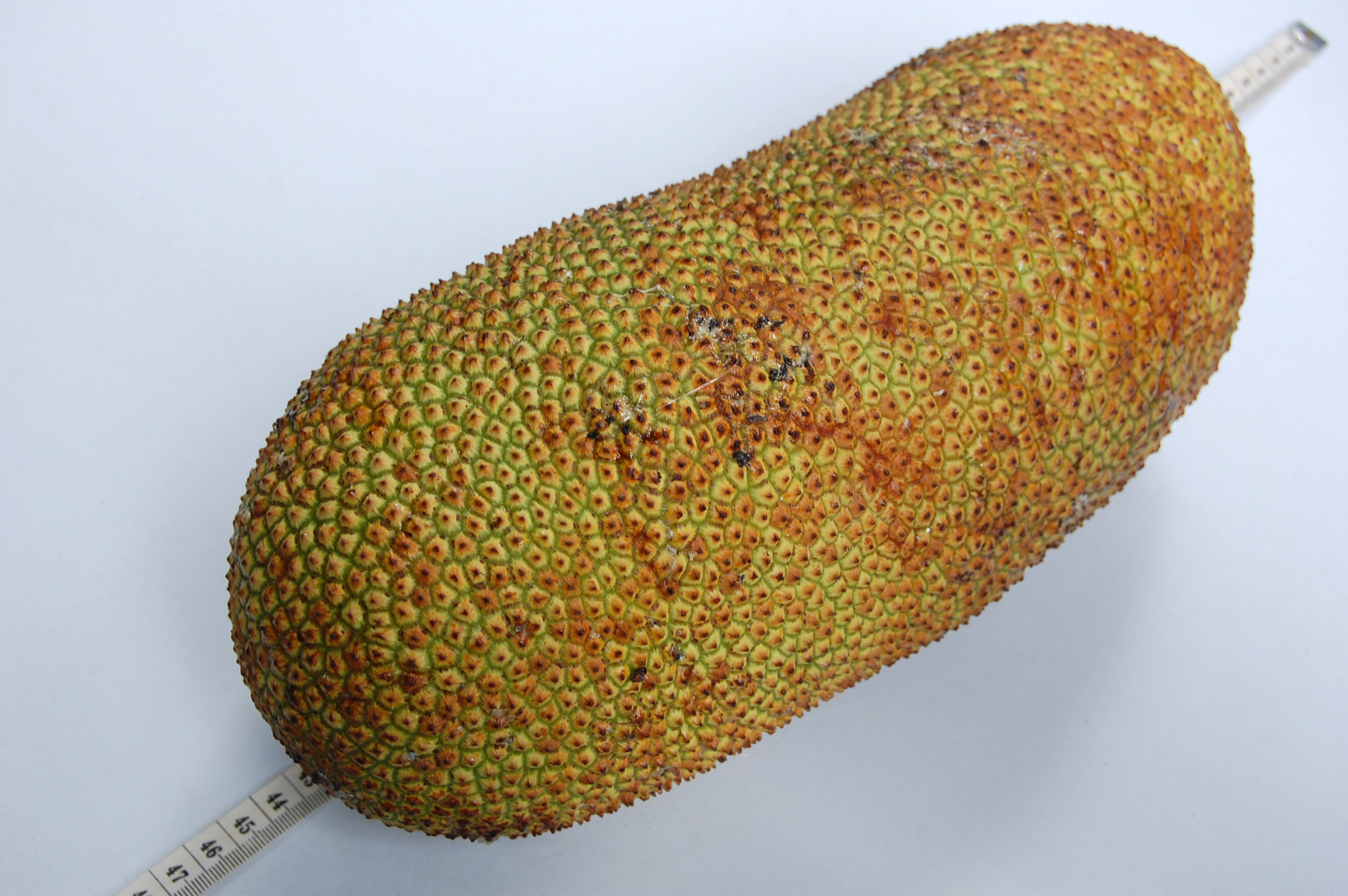 Cempedak (Bahasa Indonesia), Artocarpus integer